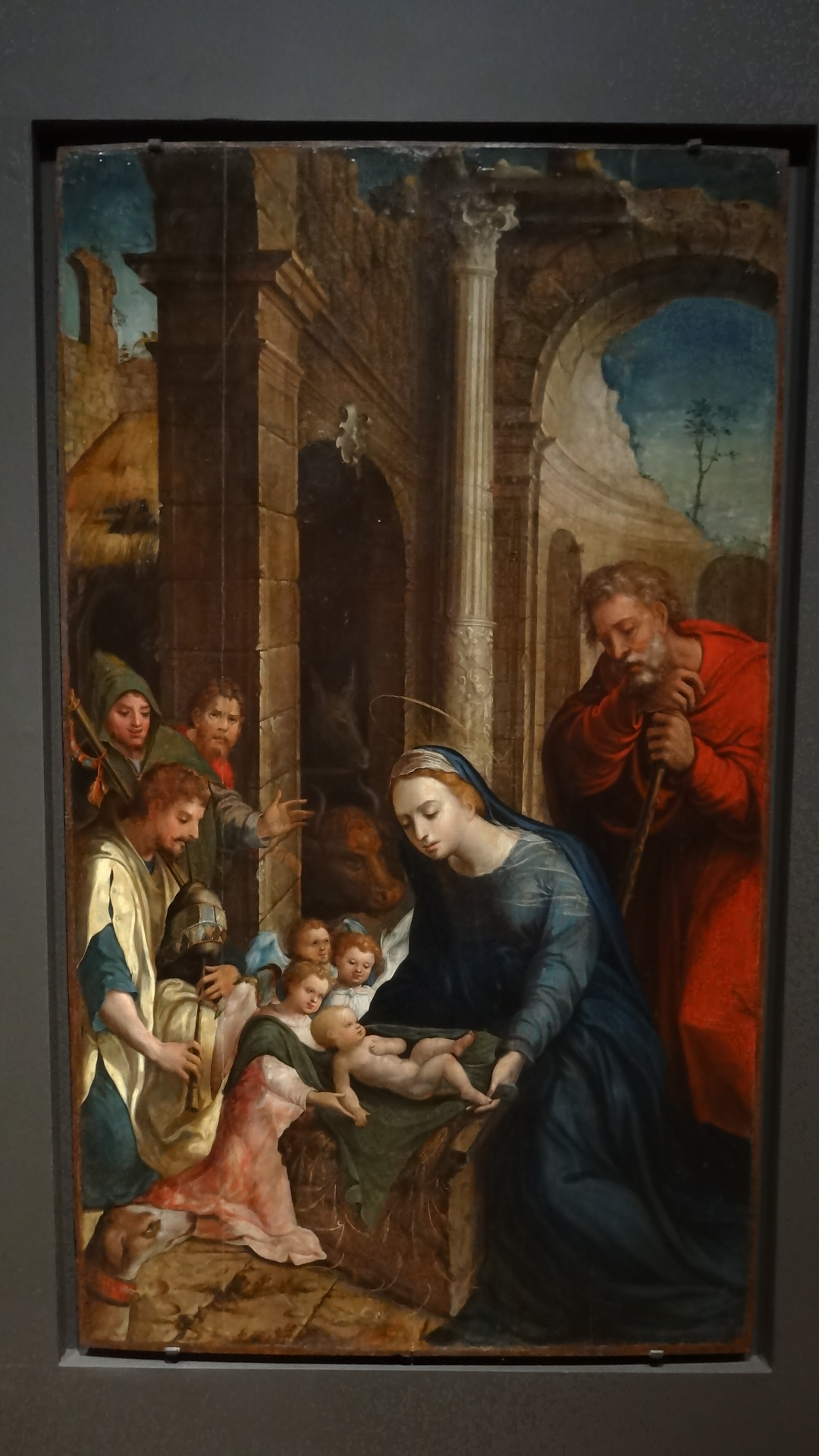 Adoração dos Pastores é uma pintura a óleo de c. 1550-60 pintado por oficina portuguesa para o Retábulo da Matriz de Santa Cruz, na ilha da Madeira.